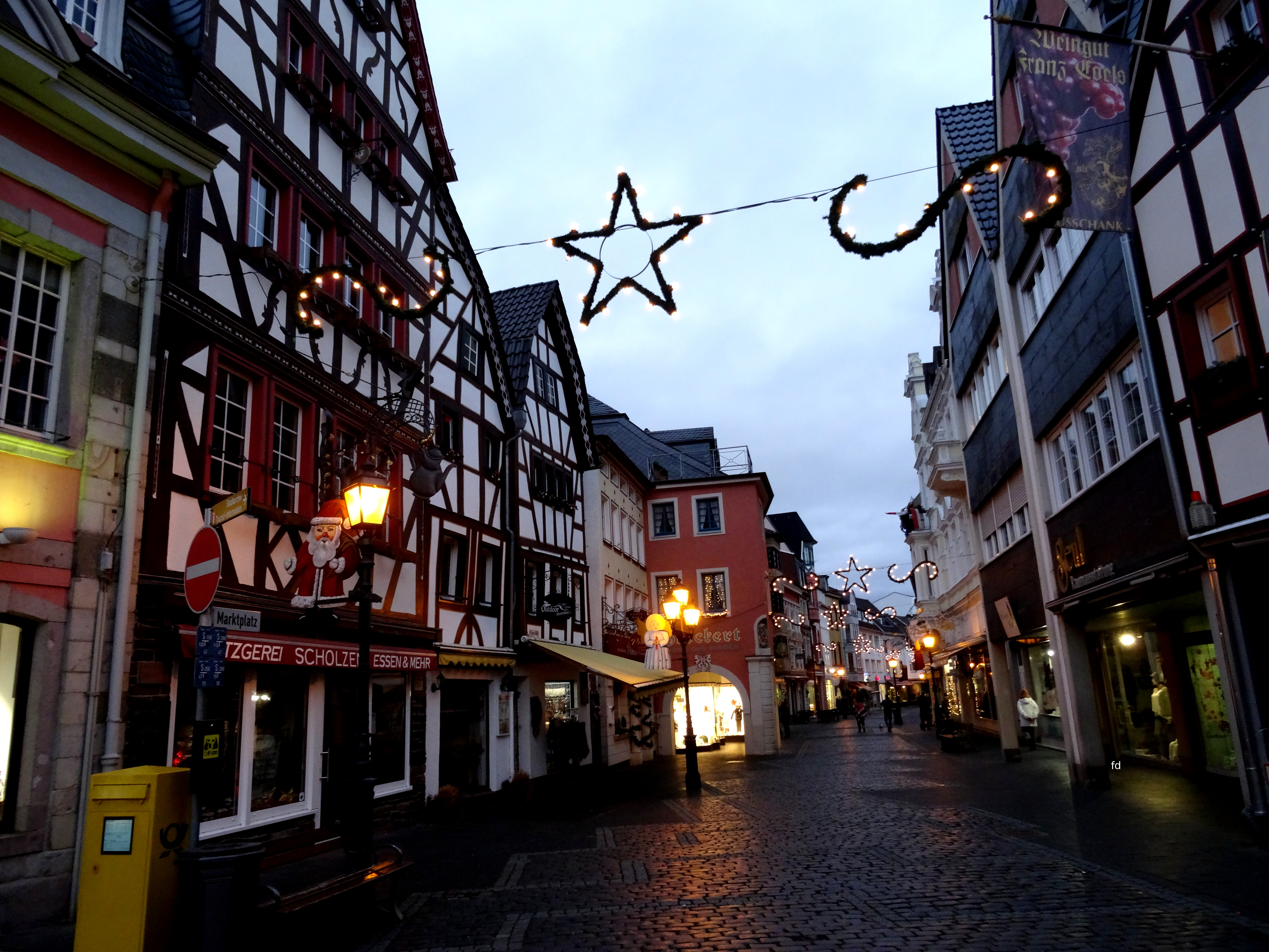 Ahrweiler Altstadt